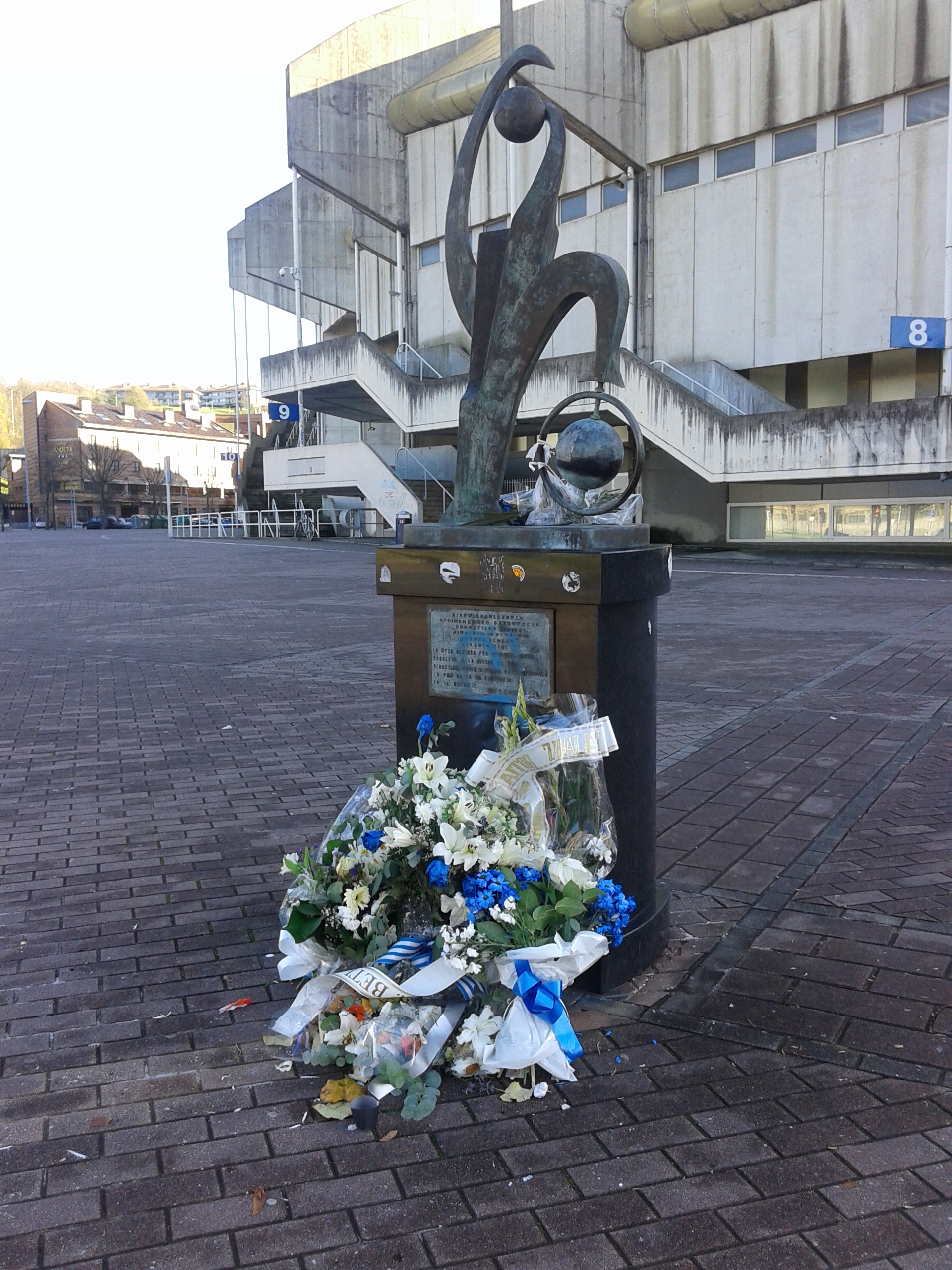 Anoetako stadiumen Aitor Zabaletari eskainitako oroigarria.